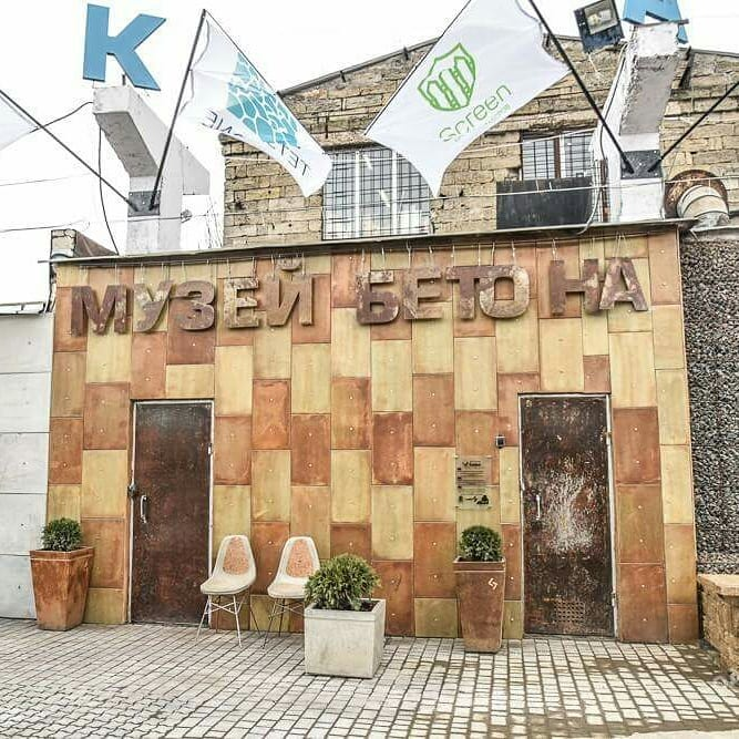 Музей бетона: главный вход.